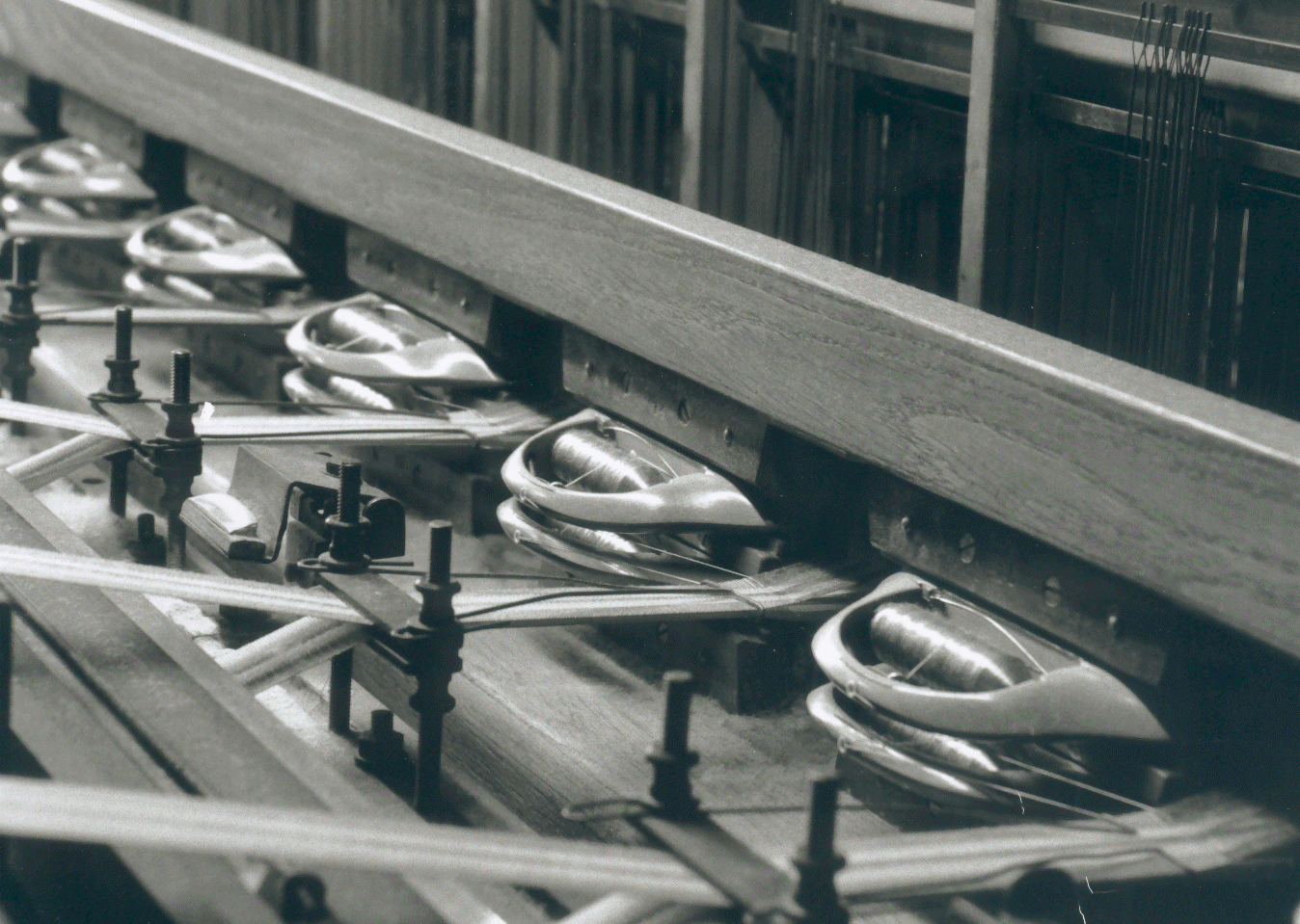 Samtbandwebstuhl der Bandfabrik Wilhlem Buesgen